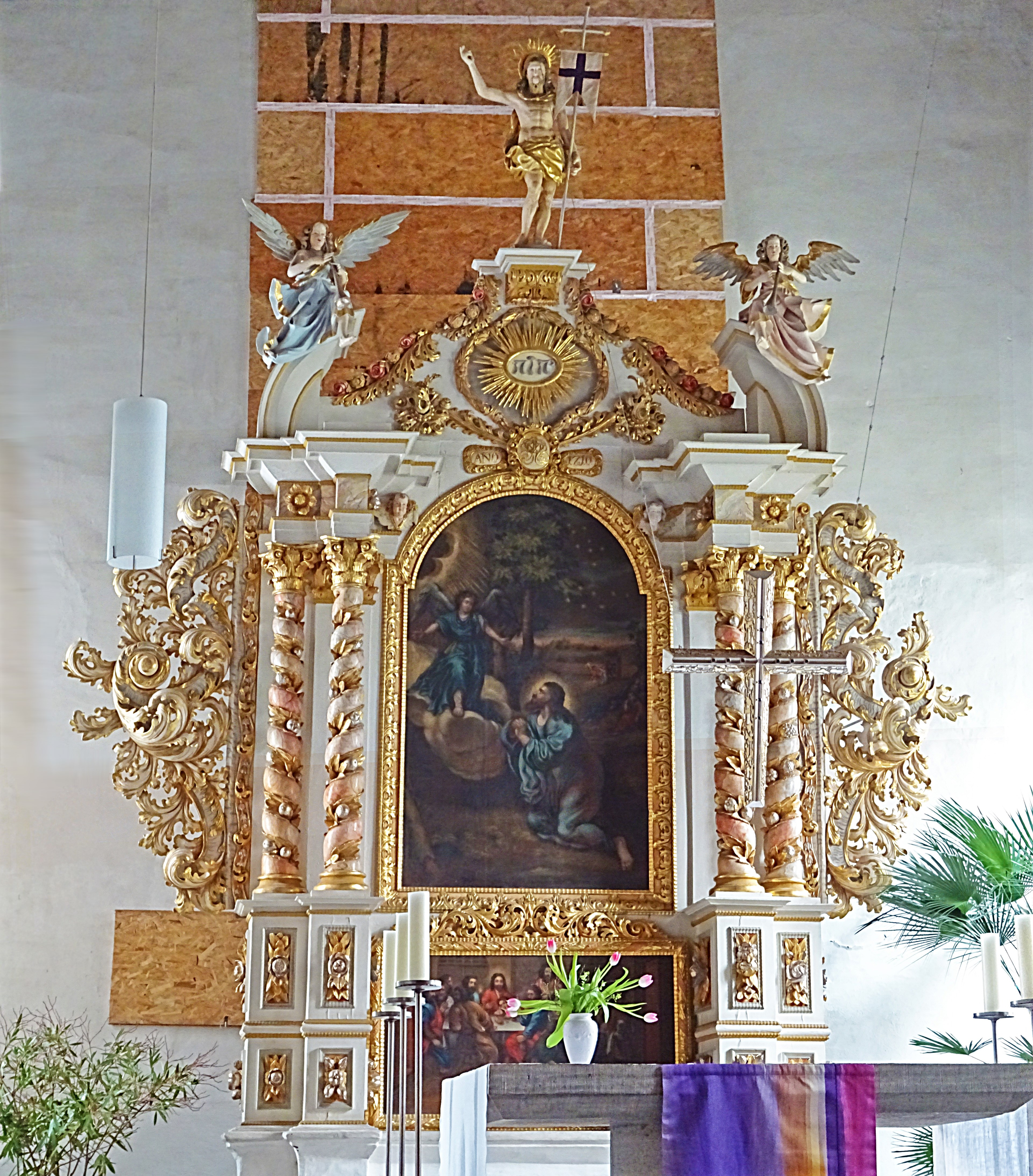 Altar in St. Marien Bleicherode